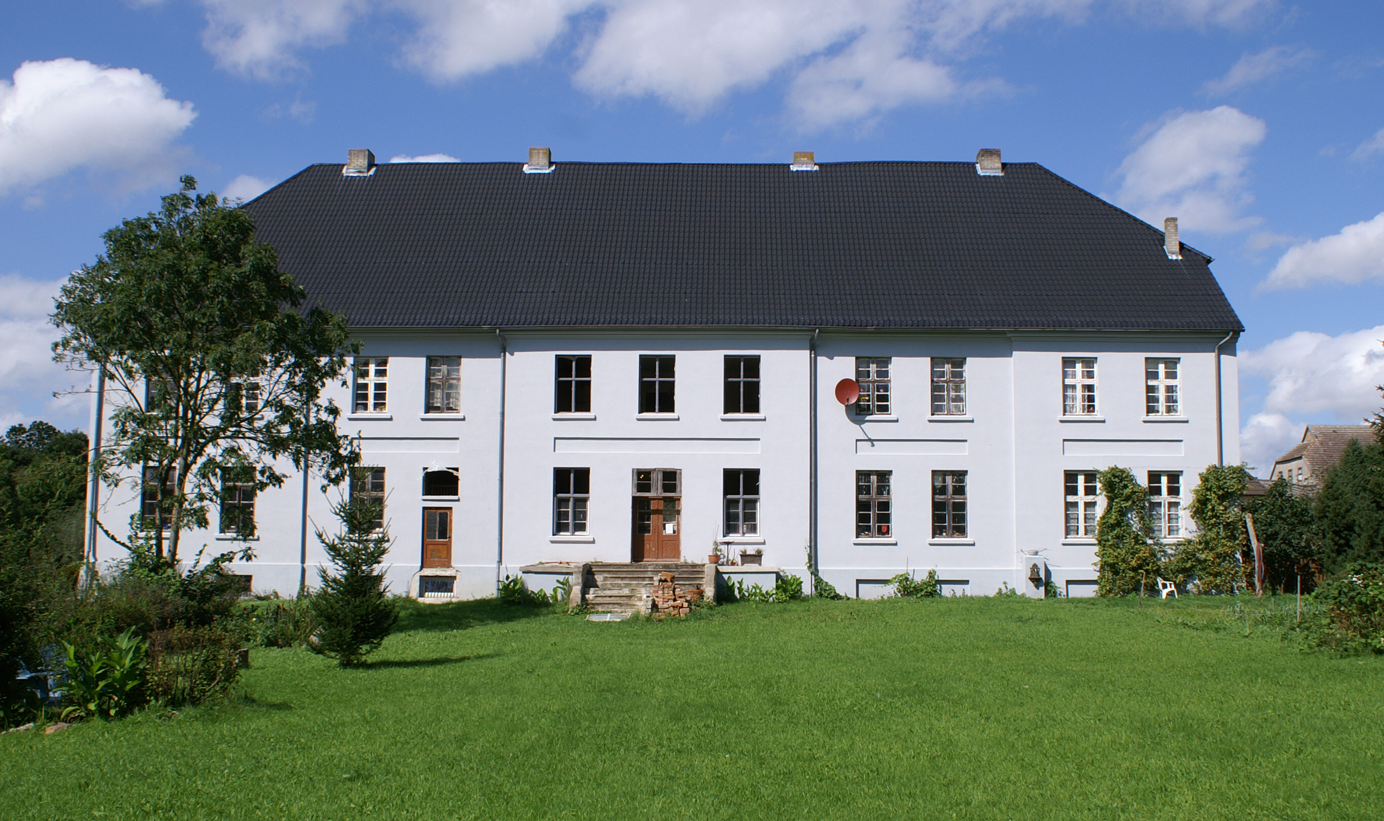 Bobbin (Landkreis Güstrow) - Gutshaus - Parkseite